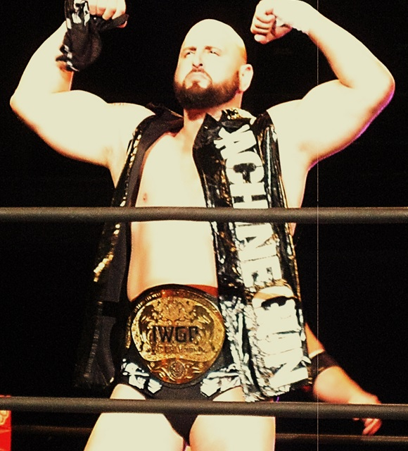 2015年3月22日 ベイコム総合体育館「Road to INVASION ATTACK 2015」カール・アンダーソン